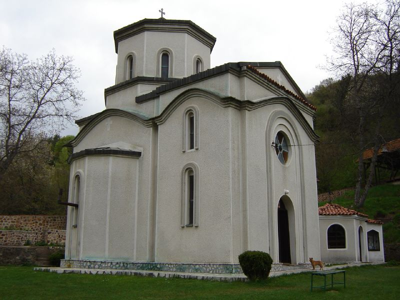 Мъжкият манастир „Успение на Пресвета Богородица“ в Берово, Република Македония.